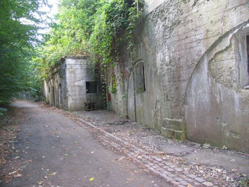 Tinghøj Batteri, struben